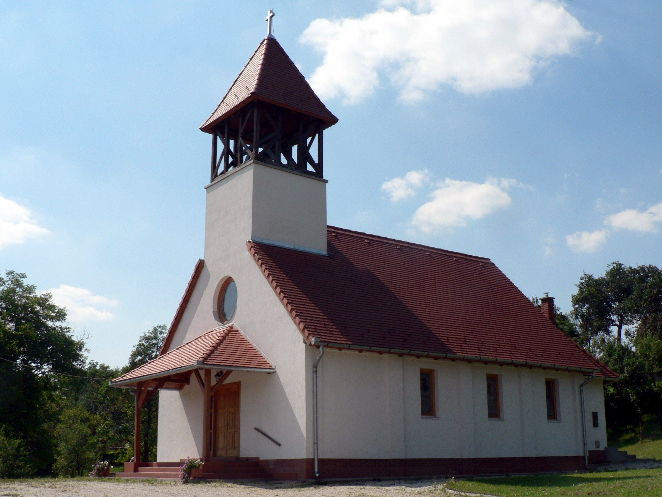 Szentgotthárd-Farkasfa Római Katolikus temploma. A templom 1999-2000-ben a 2000 éves keresztény jubileum és az 1000 éves magyar kereszténység tiszteletére épült. A templom védőszentje: Szent Anna és családja, Szent István és családja. Mangliár László okleveles építészmérnök tervei alapján épített téglaépület. - Cím: Szentgotthárd, Farkasfai út